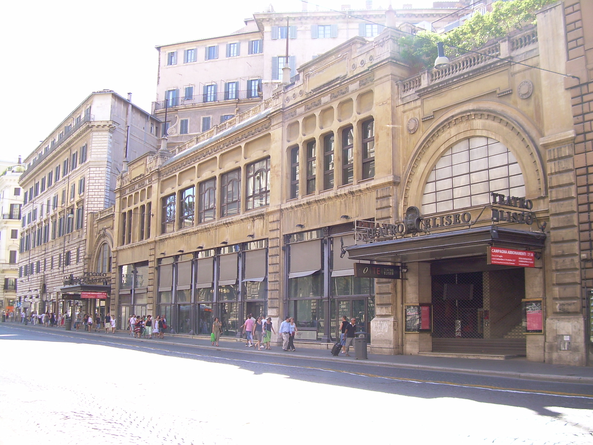 Teatro eliseo più in là il piccolo eliseo